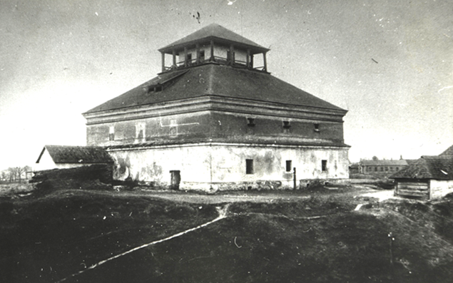 "Zamok" u Staromu Zaslavi